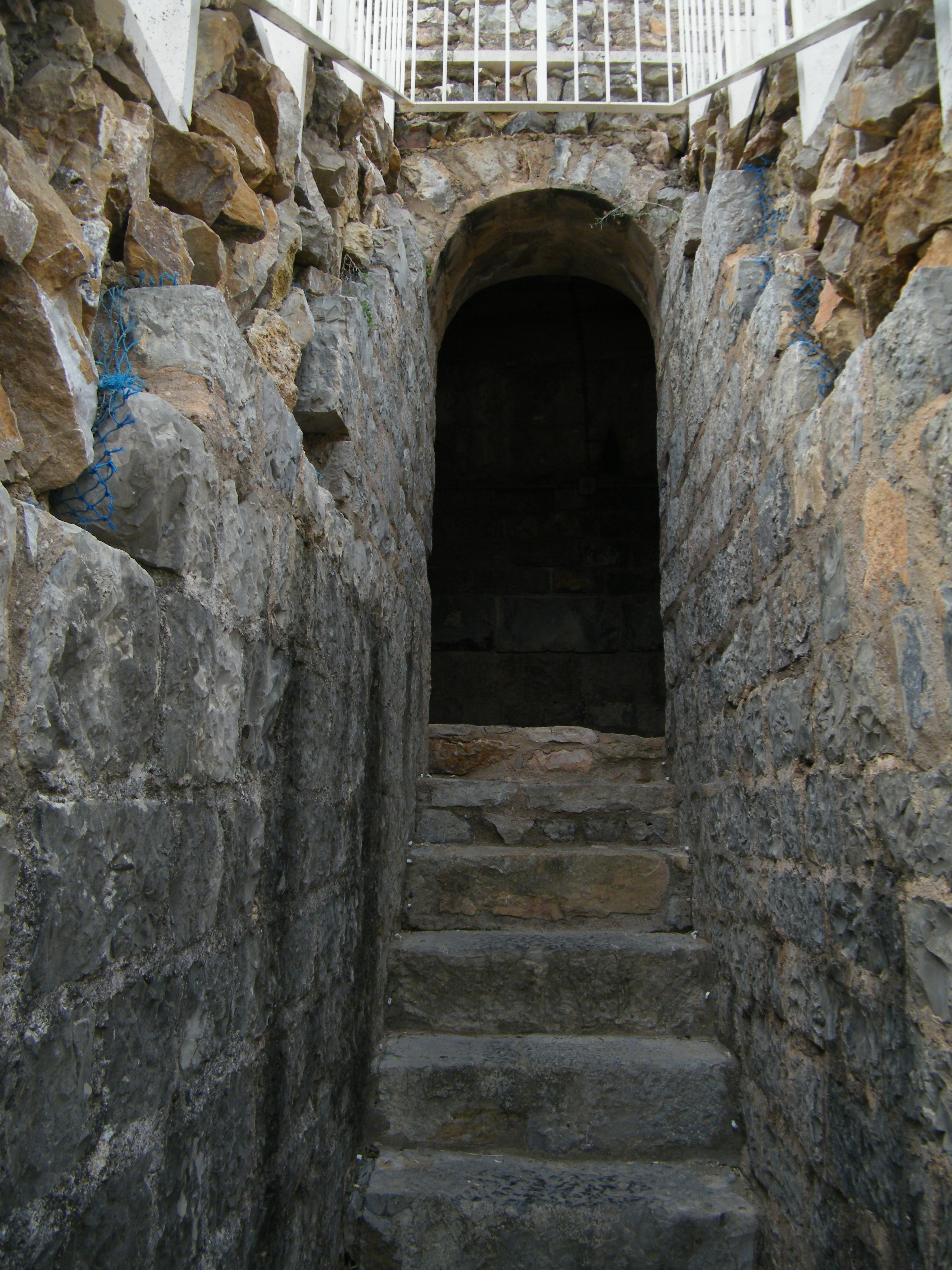 Vomitorio del Teatro romano de Sagunto.